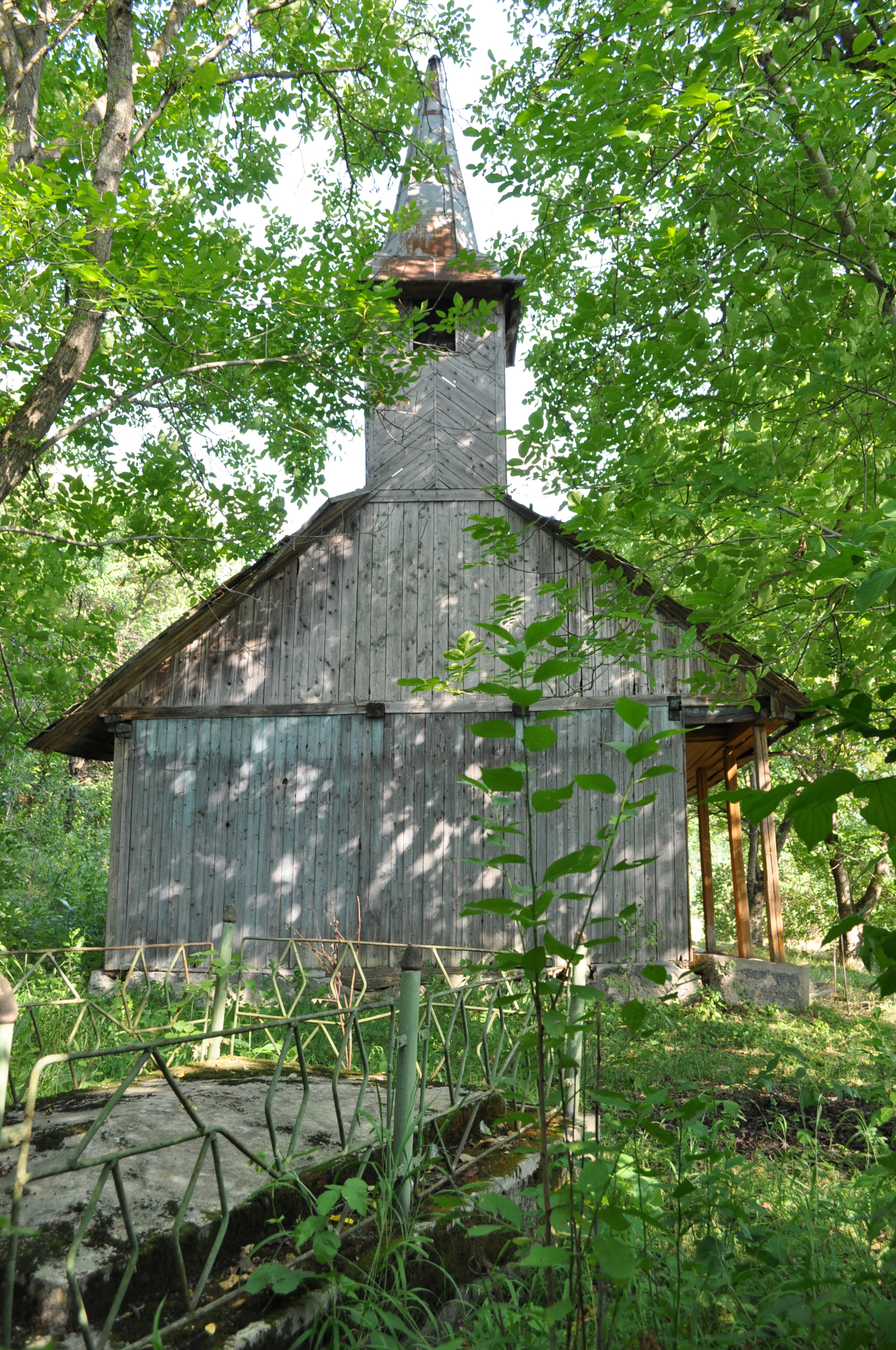 Biserica de lemn "Sf. Ioan Botezătorul" , sat COMLOD; comuna MILAŞ